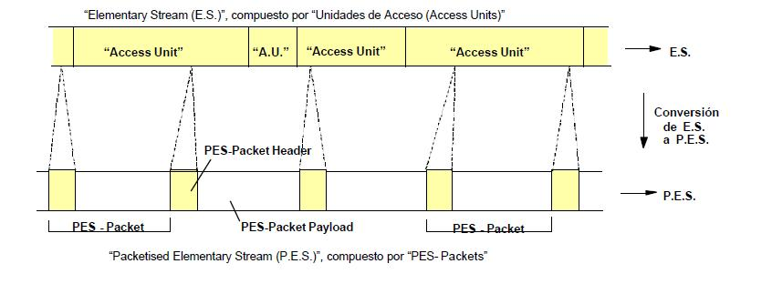 Conversión de paquetes ES a PES